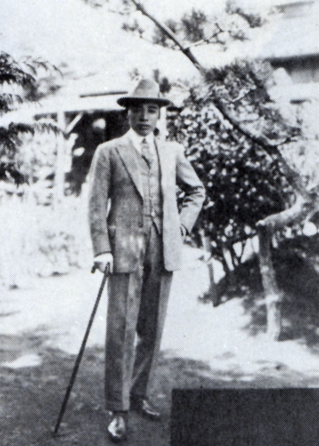 尾形藤吉、自邸前にて（1929年）